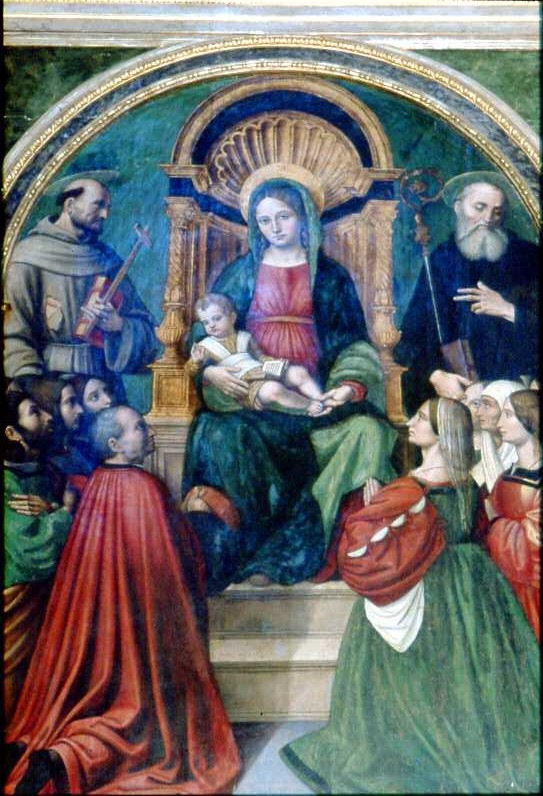 Madonna delle Grazie o Madonna greca (1727): dipinto del XV secolo attribuito al pittore palermitano Pietro Ruzzolone)